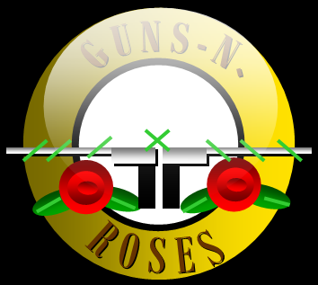 Icono simple de figuras geometricas, Guns N Roses